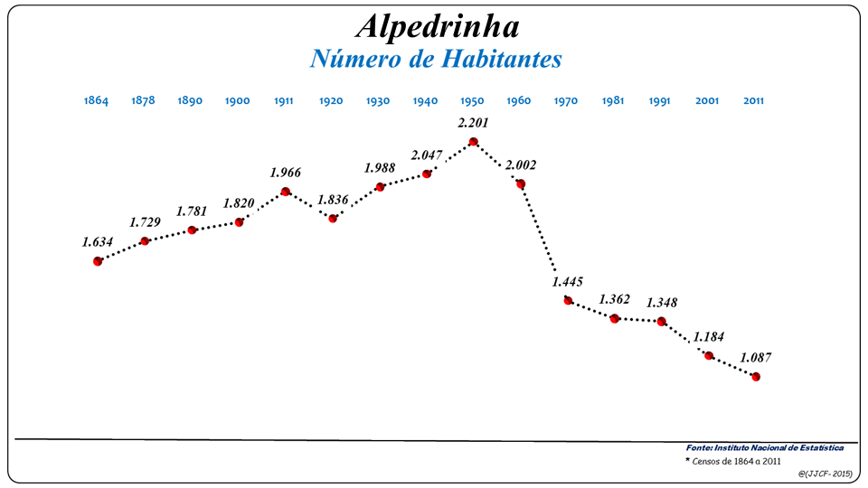 População